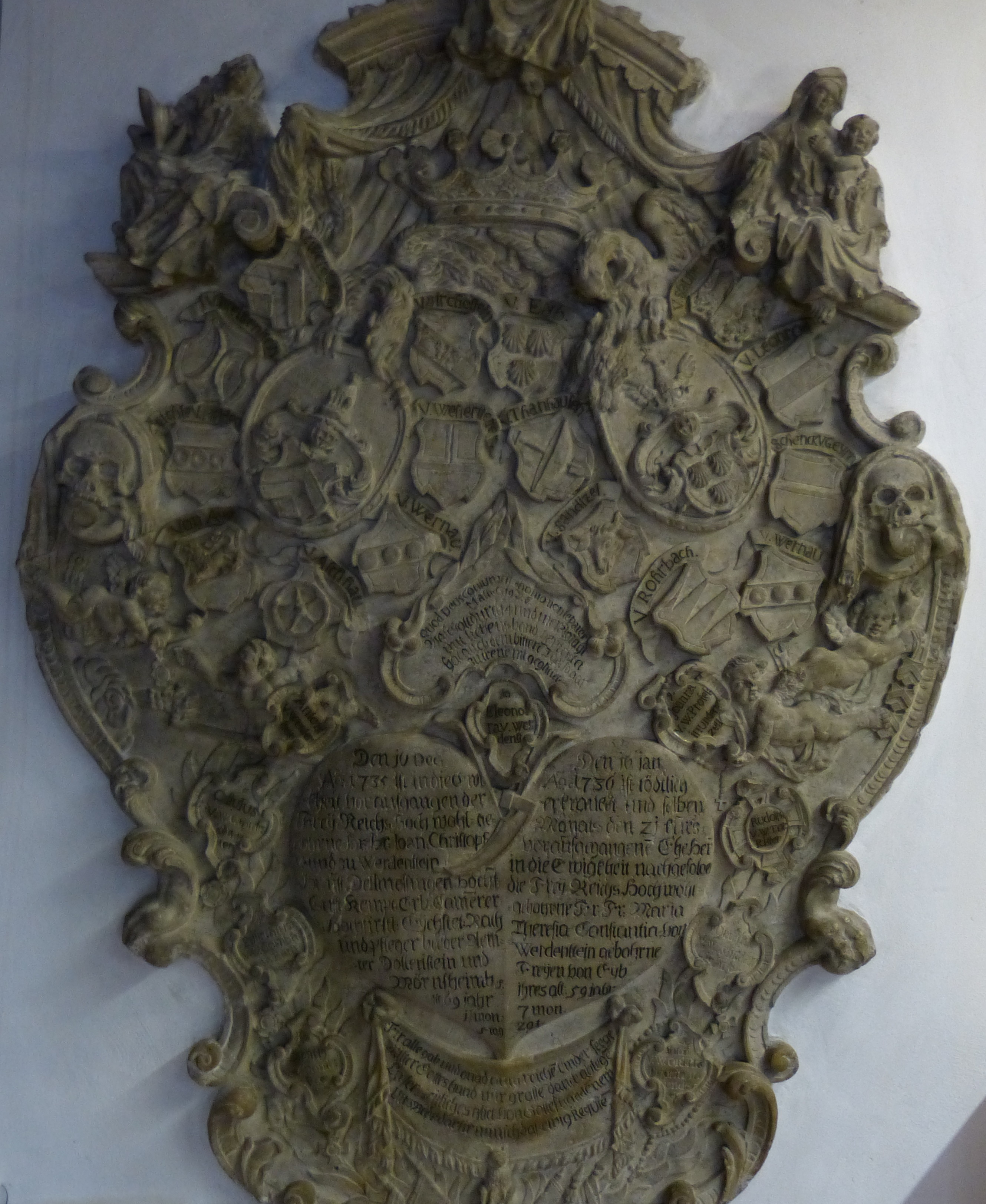 Das Grabdenkmal Eyb-Werdenstein in der Kirche Sankt Peter und Paul in Dollnstein.